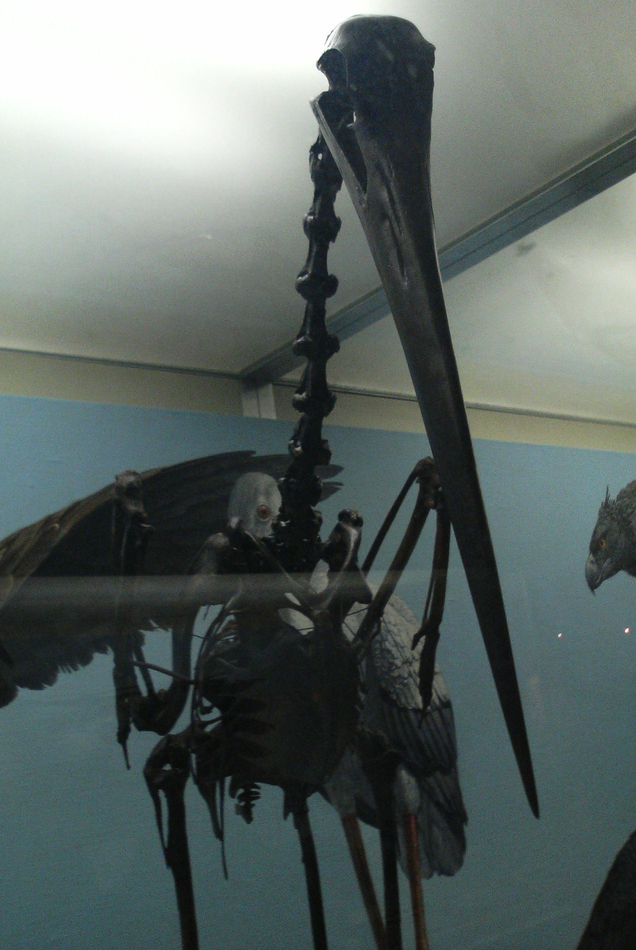 Ciconia maltha skeleton, La Brea tarpits museum, LA.